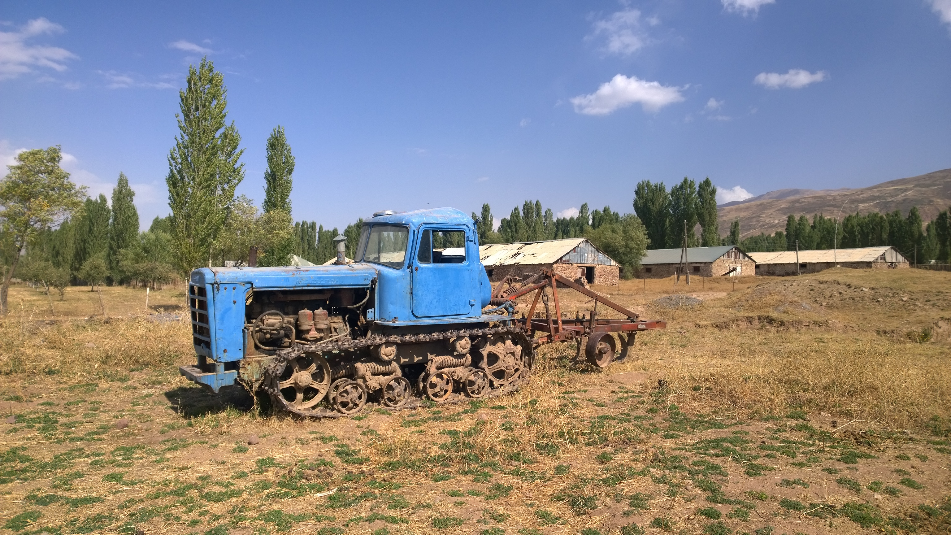 Тоҷикӣ: ДТ-75 (д. Дашти Марзо, н. Файзобод)